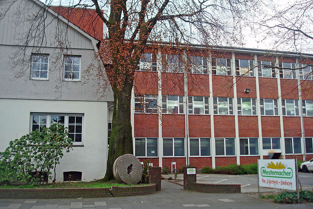 Mestemacher in Gütersloh